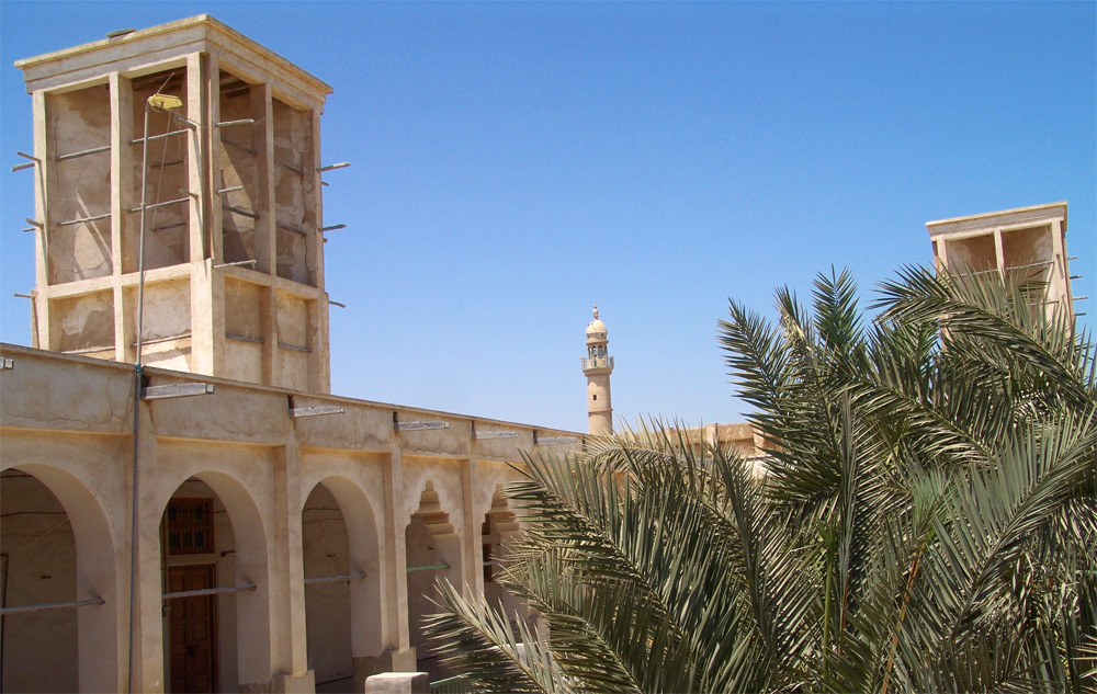 نمایی از خانه گَلبَتان در بندر کنگ